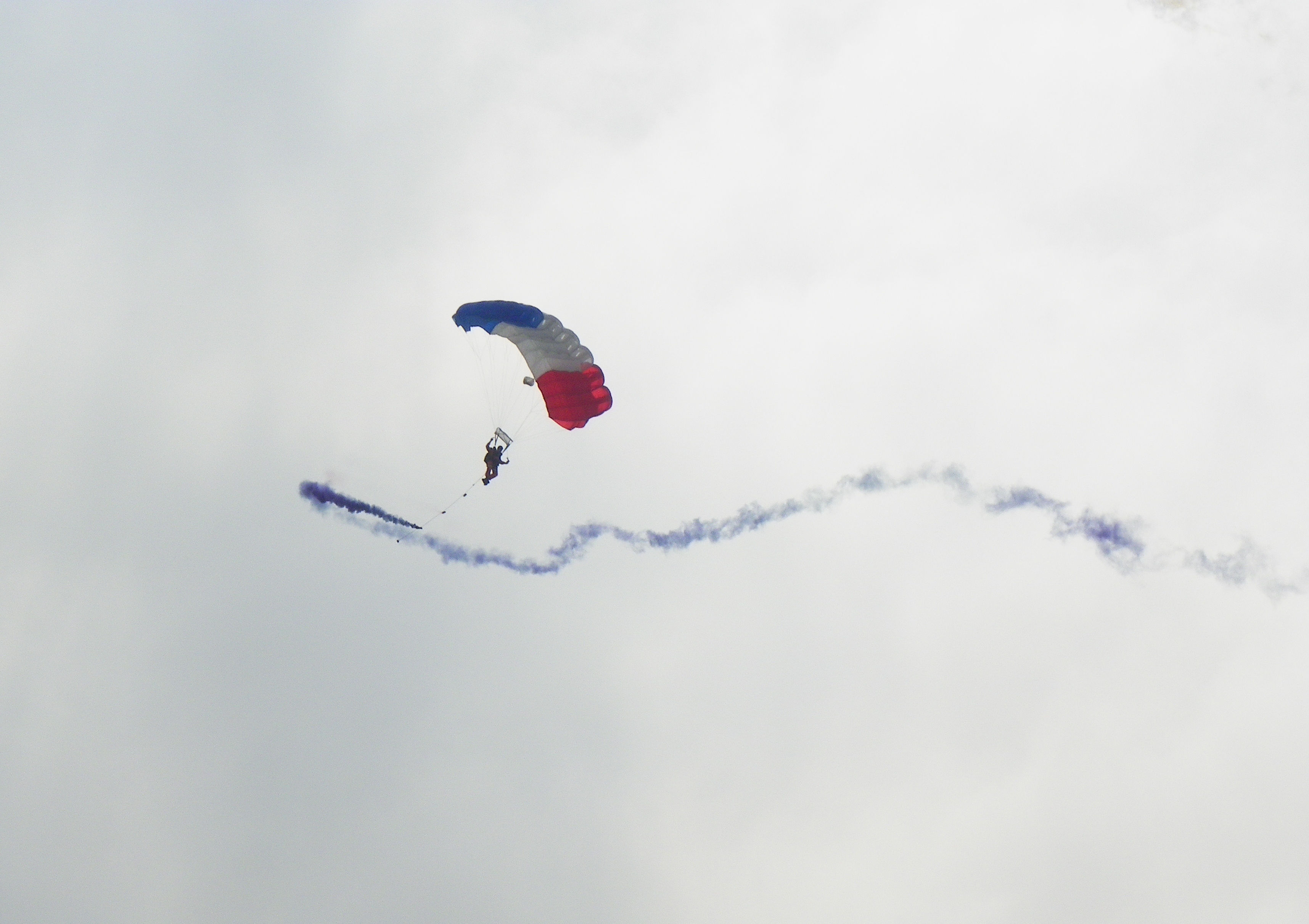 2011年陸軍湖口營區開放活動跳傘表演，中興臺校閱場上空降落中的神龍小組。